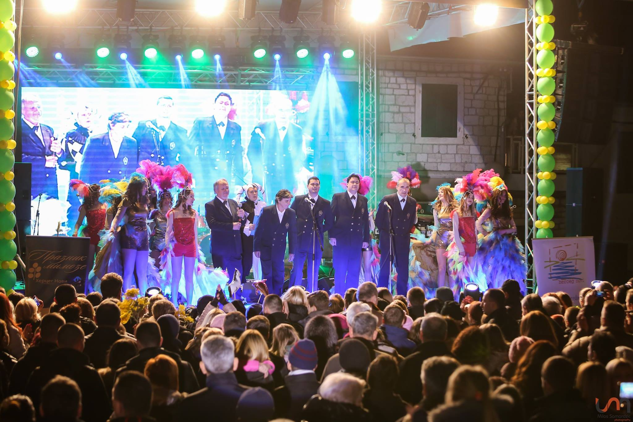 Српски (ћирилица): Стари Капетан, Херцег Нови